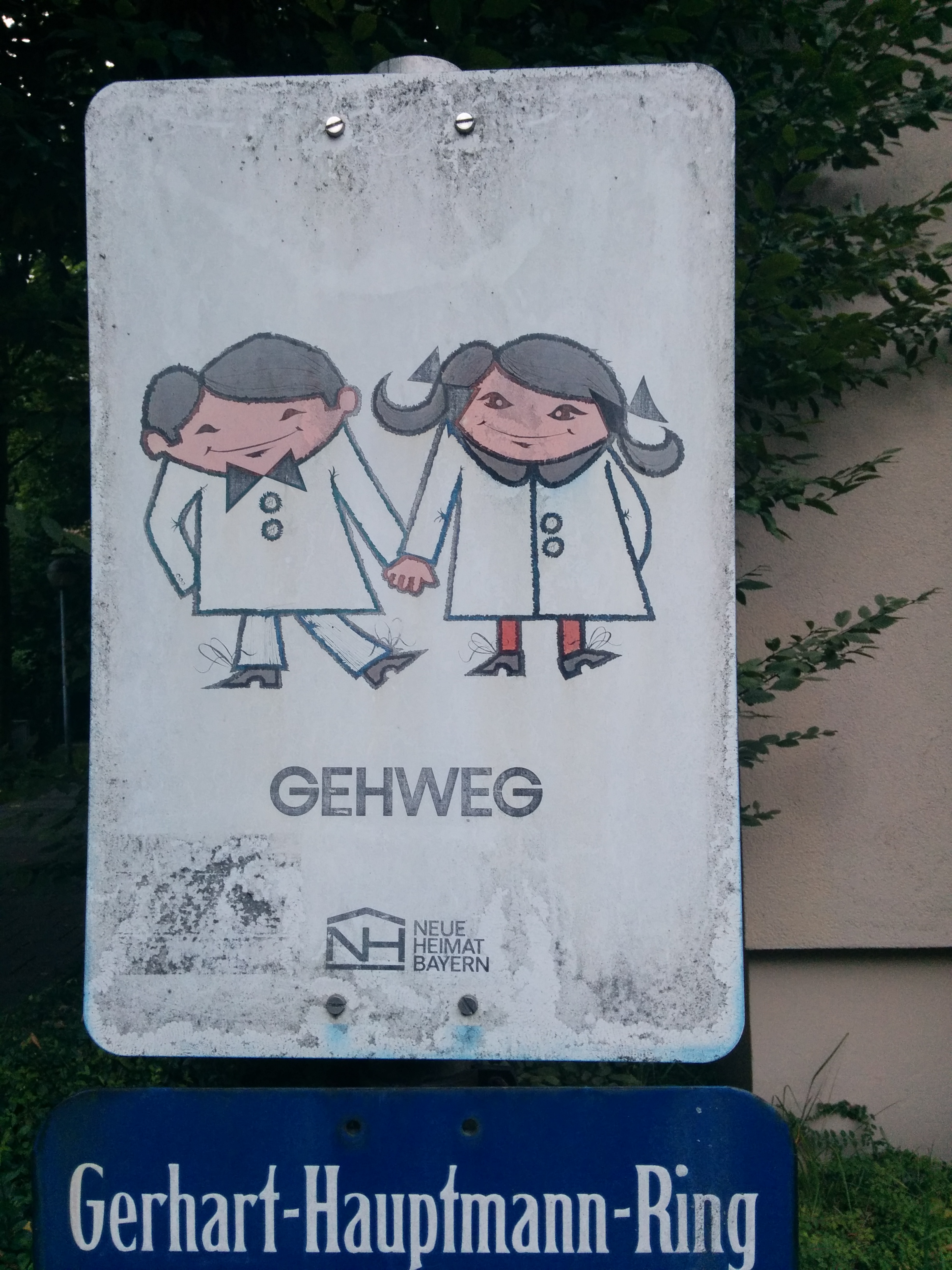 Gehweg-Beschilderung im Stil einer Siedlung der "Neue Heimat" in München Neuperlach am Gerhart-Hauptmann-Ring, Fotografiert 2014. Das Schild stammt noch dem Jahr 1975 und repräsentiert eine vom Neue-Heimat-Architekten Ernst Hürlimann gestaltete Symbolik, mit welcher seinerzeit die ganze Siedlung in Neuperlach ausgeschildert war. 2015 sind von ursprünglich hunderten nur noch wenige der Originalschilder übrig.